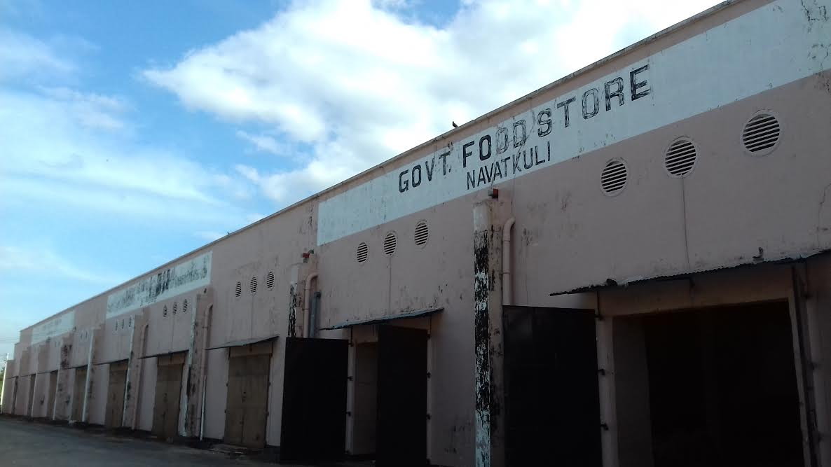 அரச உணவுக் களஞ்சியம்